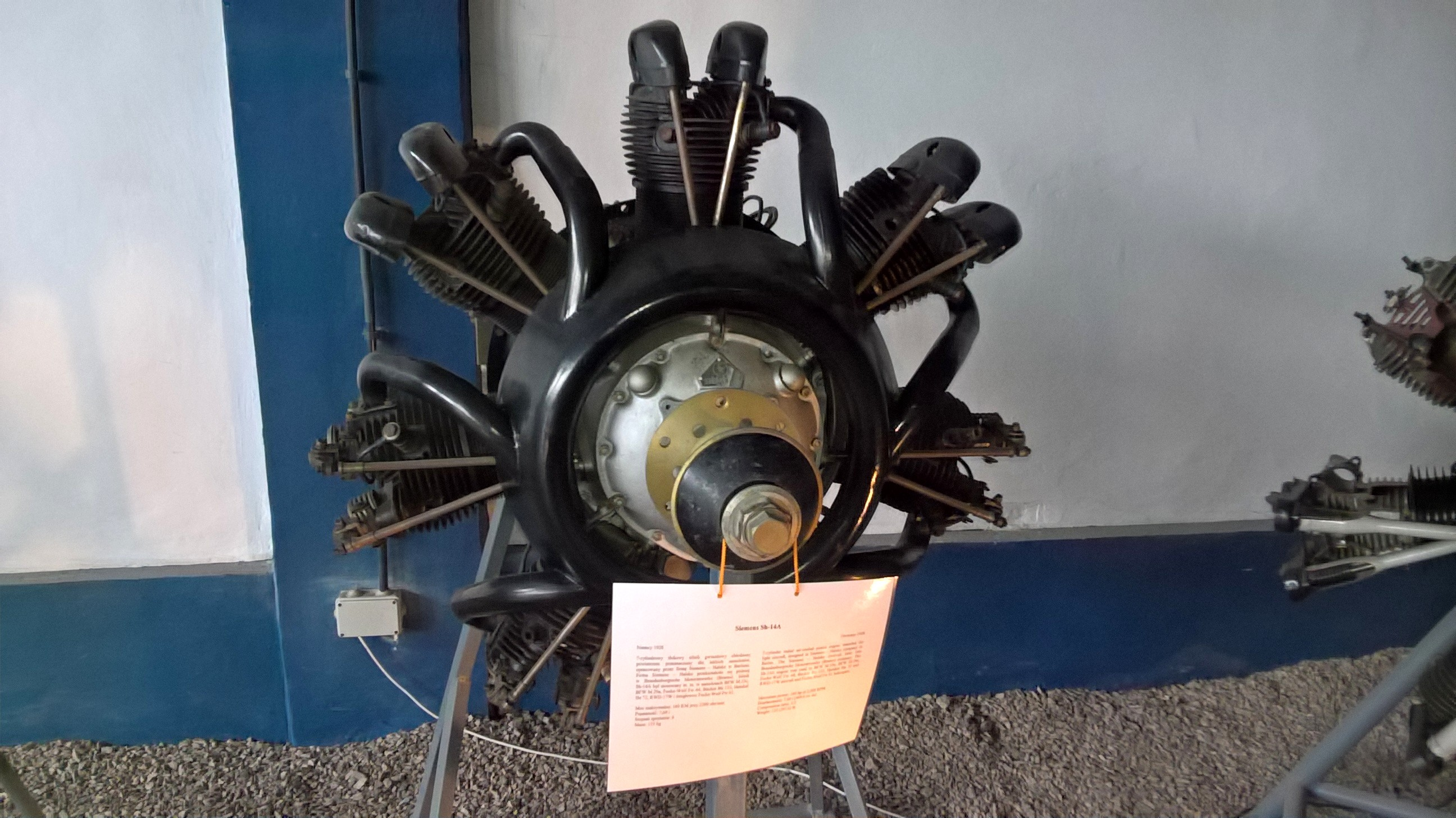 Niemiecki 7-cylindrowy silnik gwiazdowy Siemens-Halske Sh-14A ze zbiorów Muzeum Lotnictwa Polskiego w Krakowie.